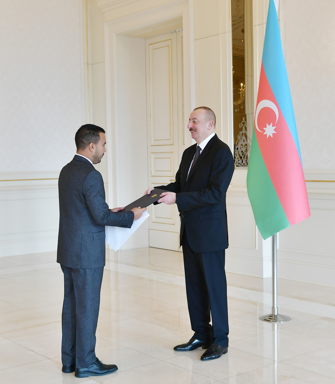 Prezident İlham Əliyevə etimadnaməni təqdim edərkən